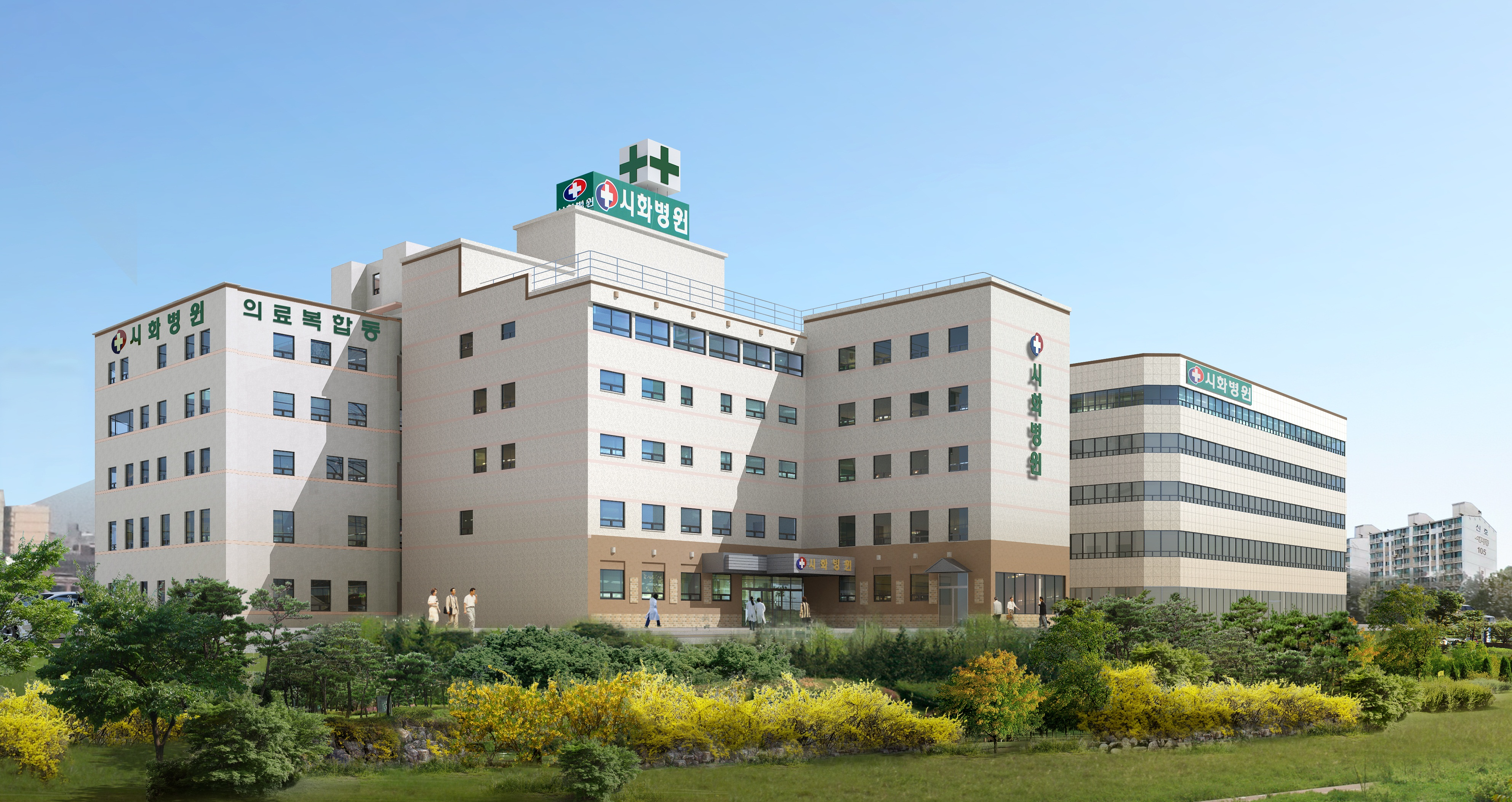 시화병원 전경